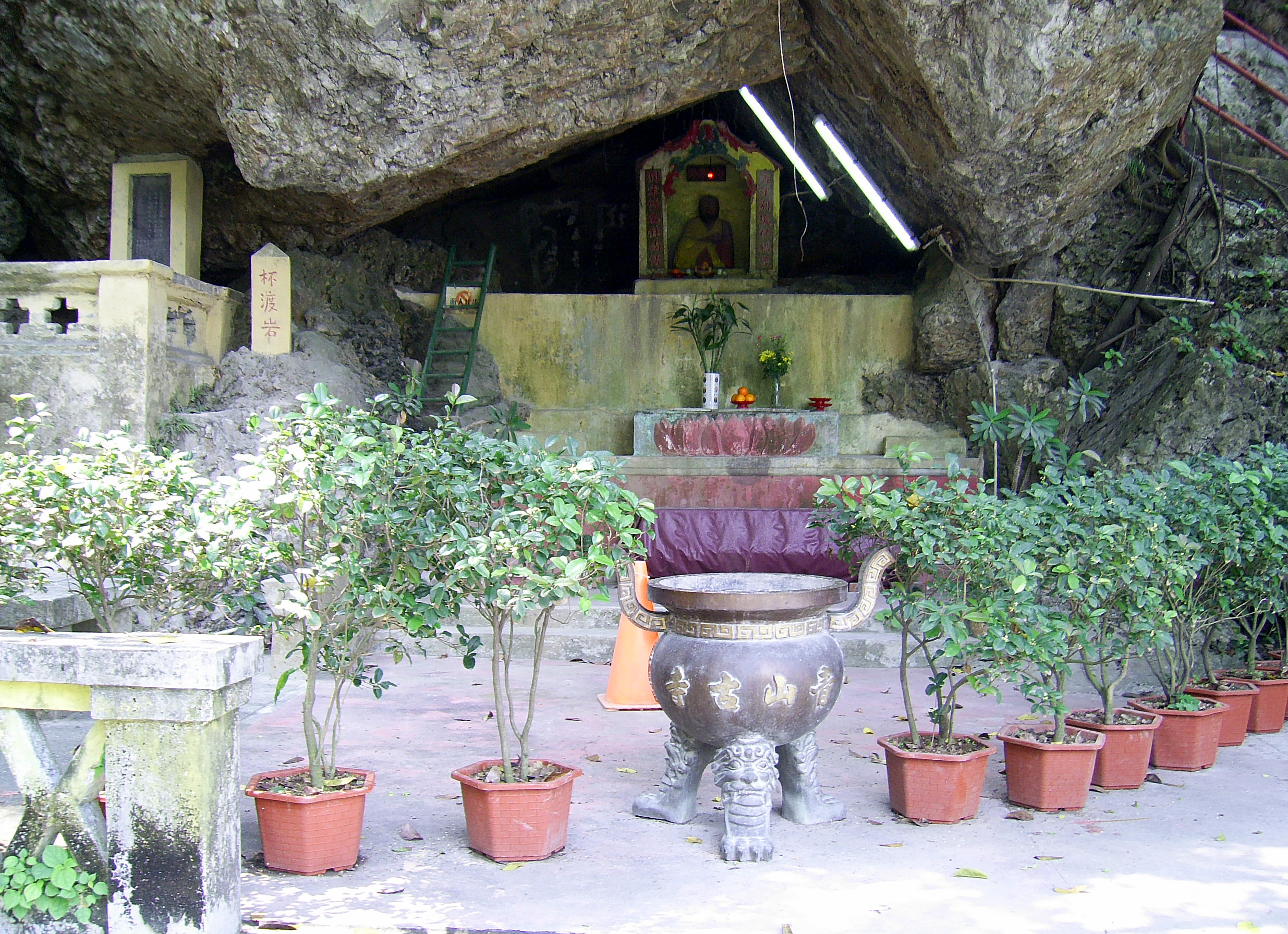 中文（香港）: 杯渡岩